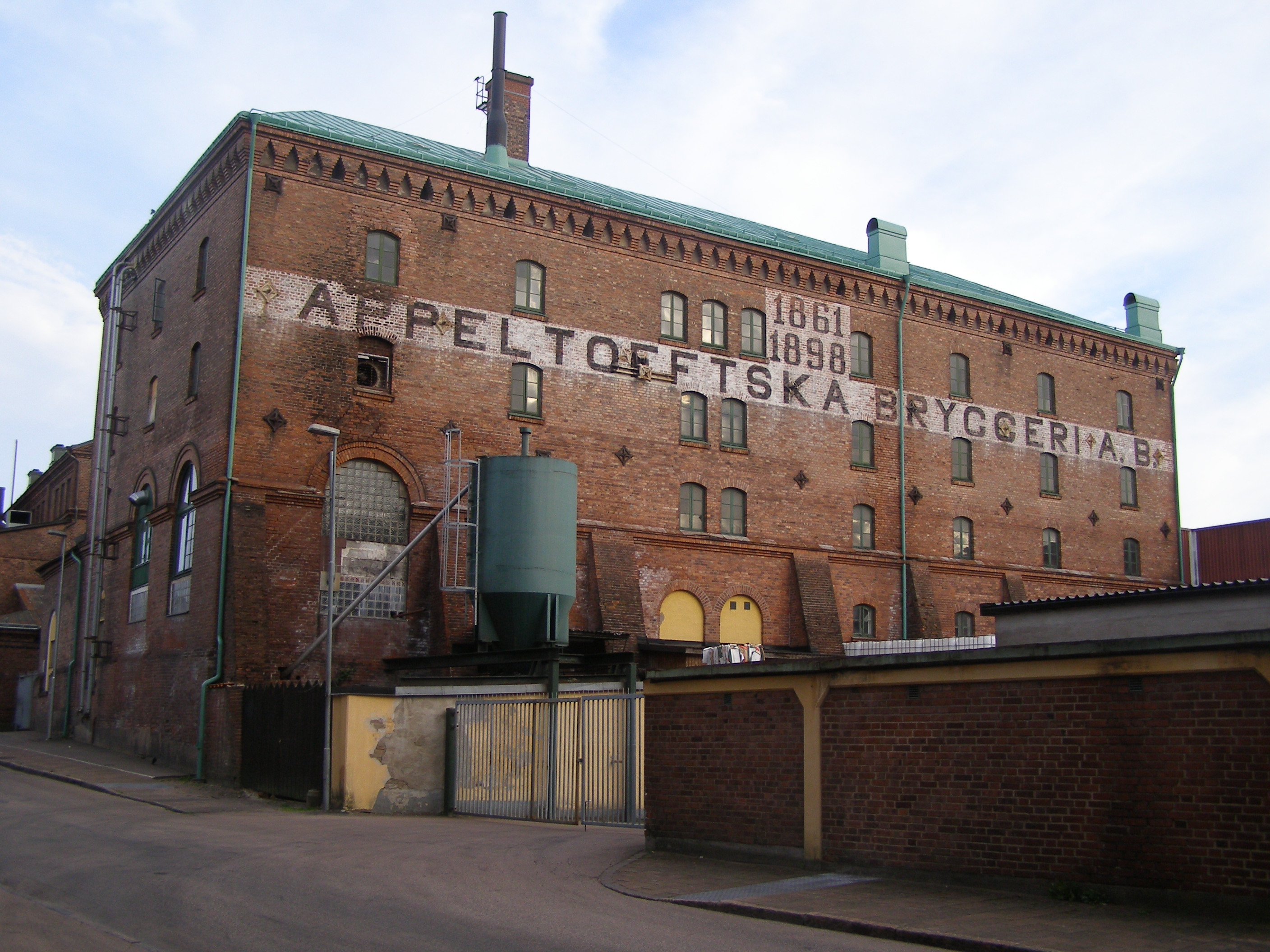 Krönleins bryggeri, tidigare Appeltofftska. Bryggeri i centrala Halmstad.